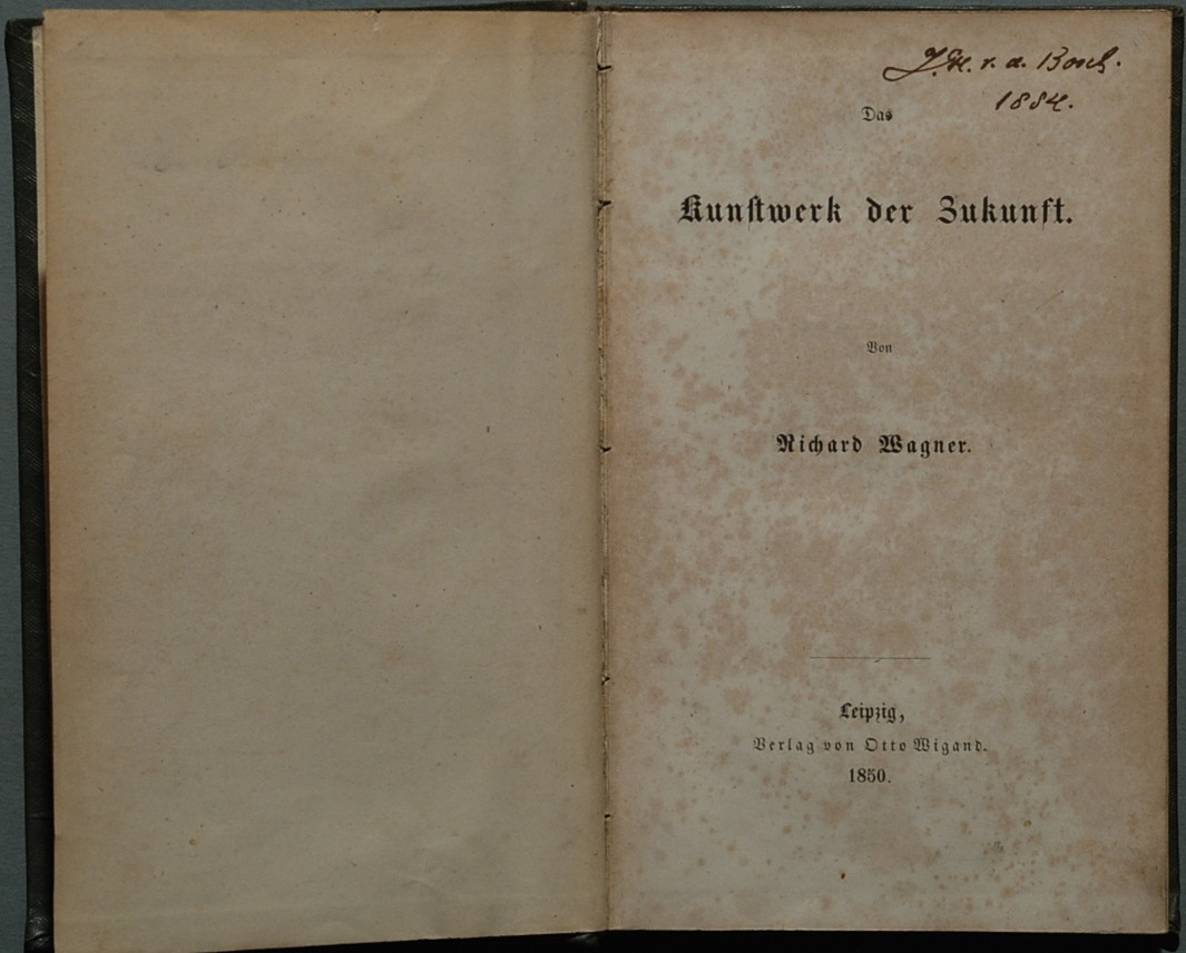 Titelblatt des Erstdrucks von Richard Wagner, Das Kunstwerk der Zukunft (1850)